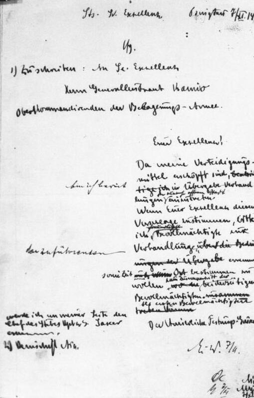 Schutzgebiet Kiautschou Dokumente, Karrikaturen, Veröffentlichungen Entwurf des Übergabeschreibens von Tsingtau, vom 7.11.1914